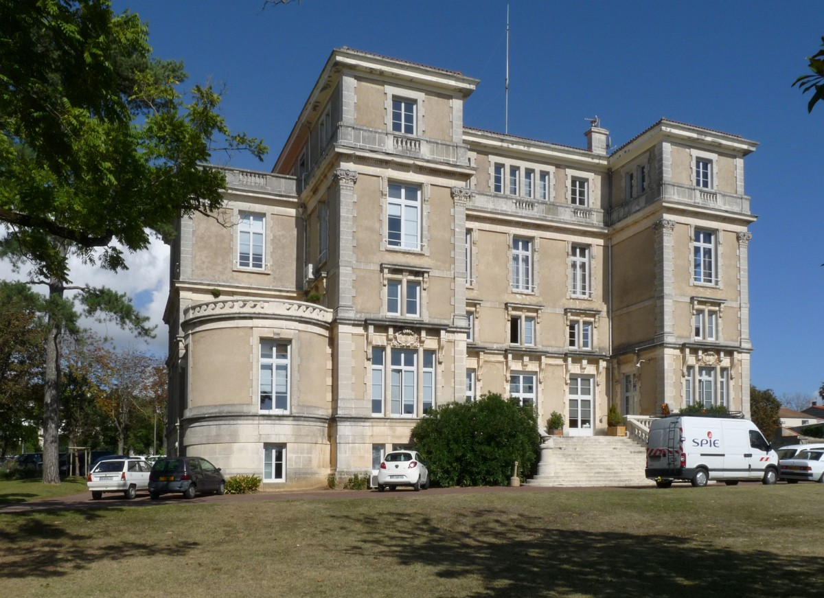 Arrière de l'hôtel de ville (ancienne villa les Palmiers rehaussée), Royan, Charente-Maritime, France